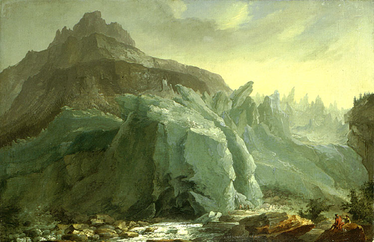 Die unteren Schopffelsen sind teilweise vom Eis überdeckt. Standpunkt des Malers nahe dem heutigen Eingang zur Gletscherschlucht; Blick Richtung Mettenberg